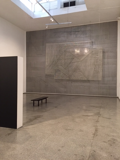 Mural de Bruselas, Jesús Soto (1958). Museo de Bellas Artes de Caracas.